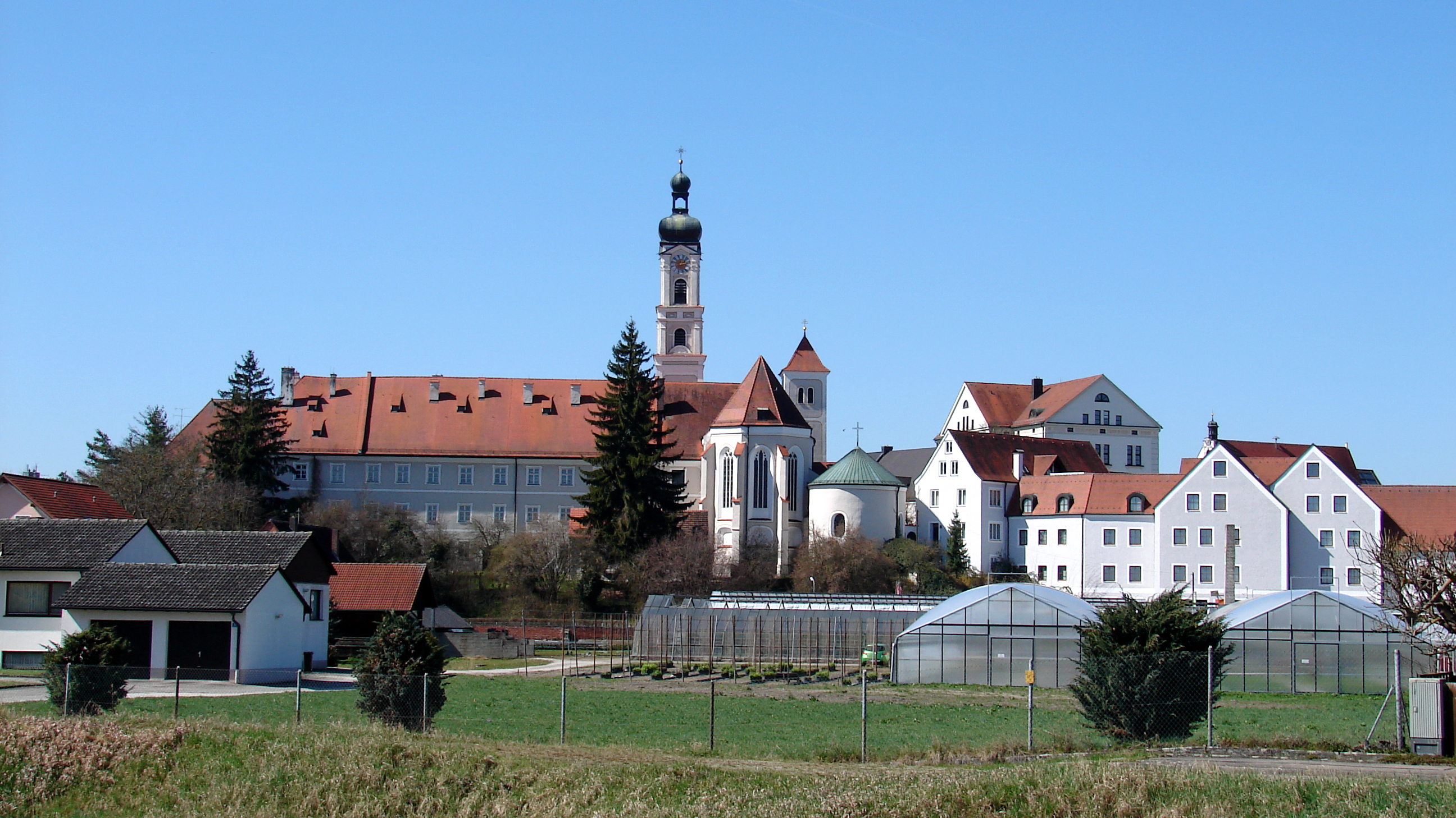 Das Kloster Geisenfeld ist ein ehemaliges Kloster der Benediktinerinnen in Geisenfeld in Bayern in der Diözese Regensburg.